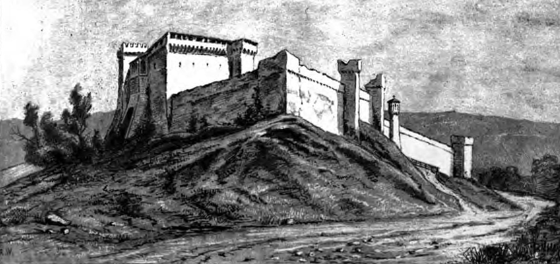 Ruines du Château fort de Gradara.